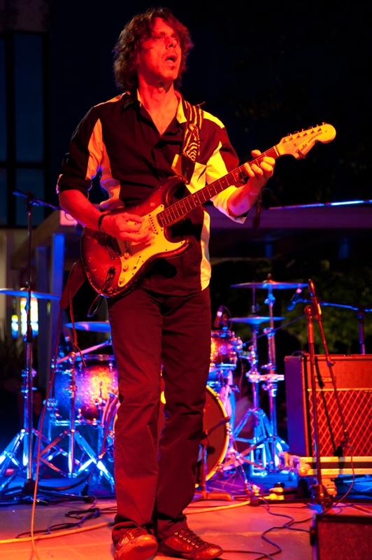 Aerodrom Jurica Pađen